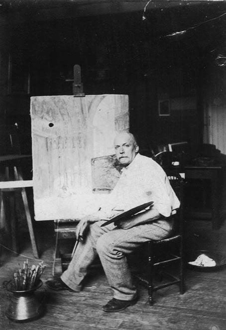 Louis Monziès